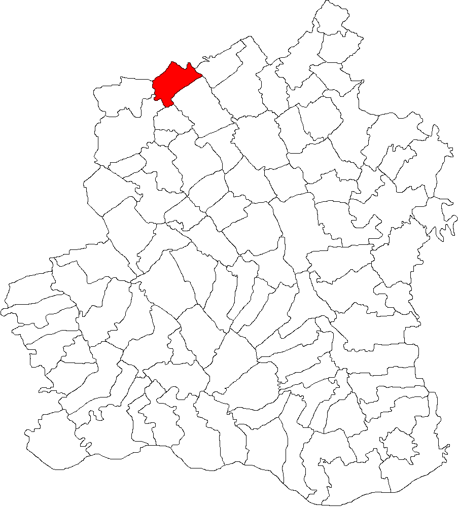 Categorie:Hărţi ale judeţului Teleorman